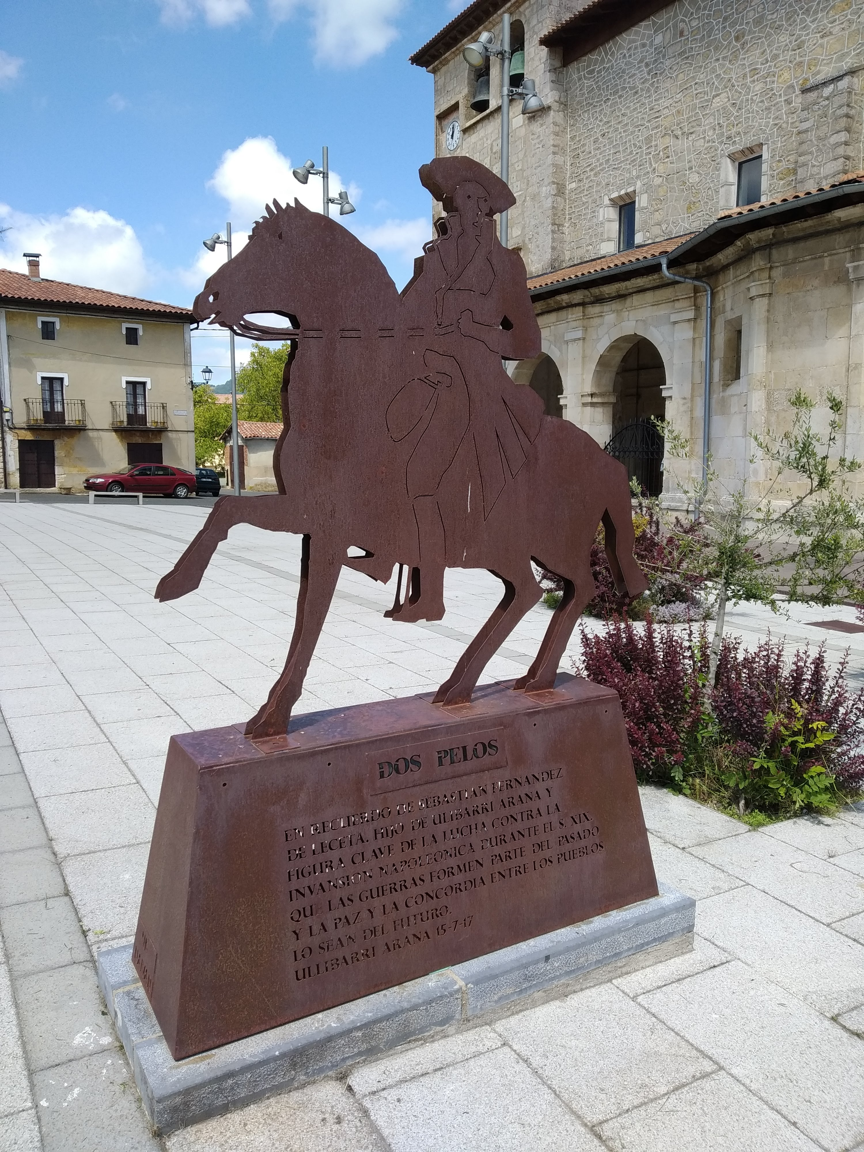 Sebastian Fernandez de Lezeta, Dos Pelos, Uribarri Haranako gerrilaria. Estatua du herriko plazan, 21. mendean eraikia